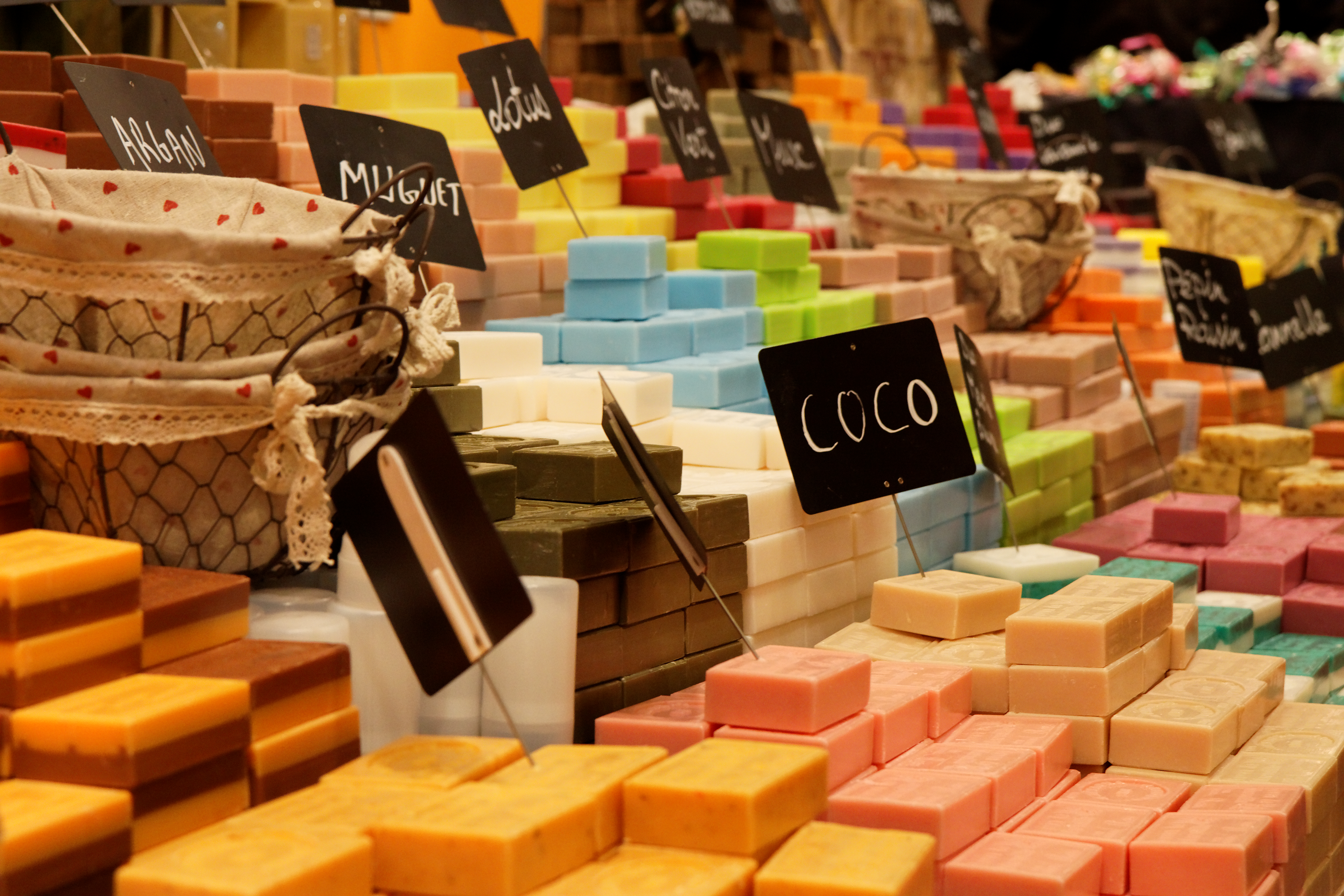 Le salon de l'agriculture de Paris en 2011.